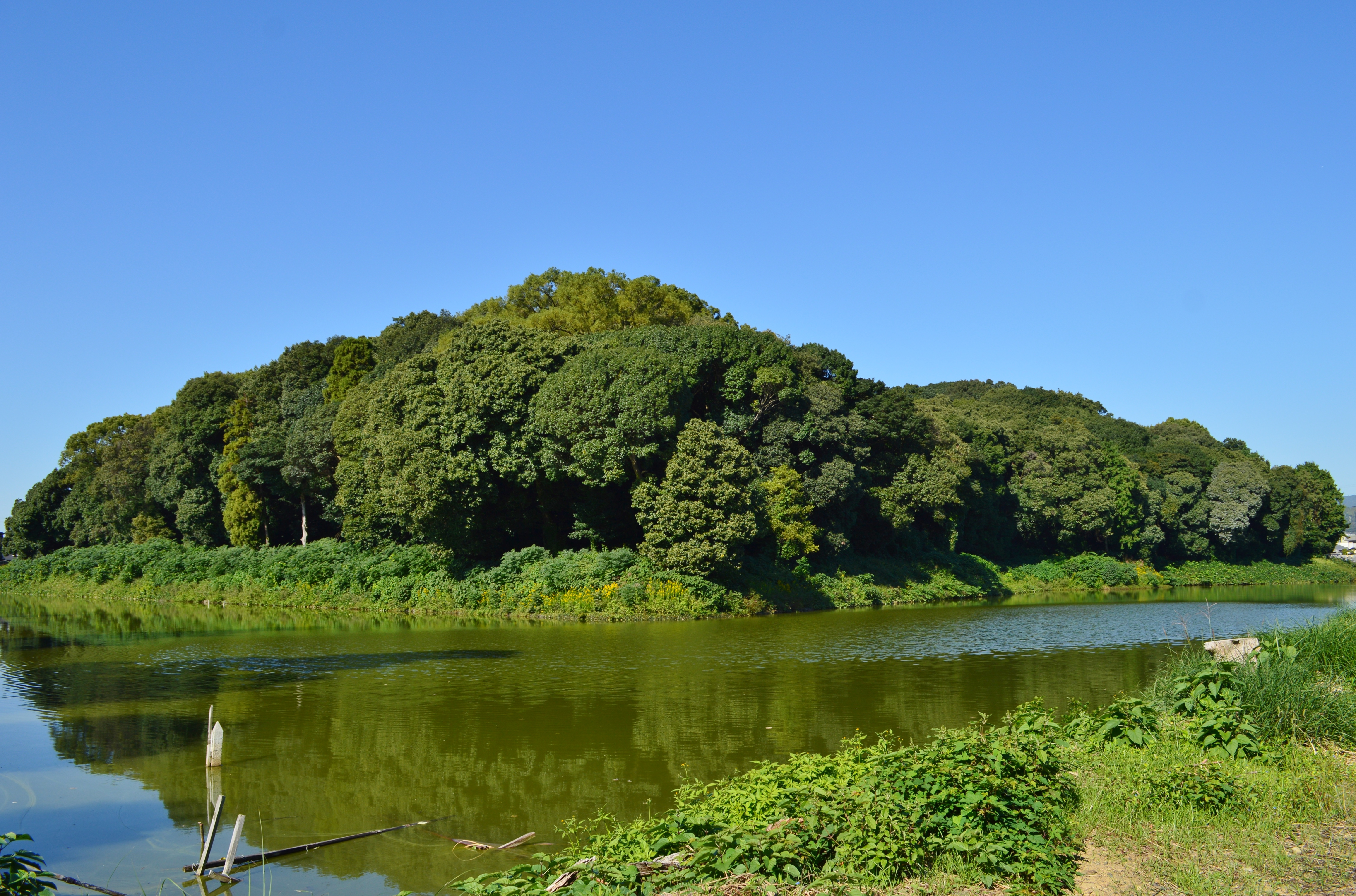 太田茶臼山古墳 墳丘全景